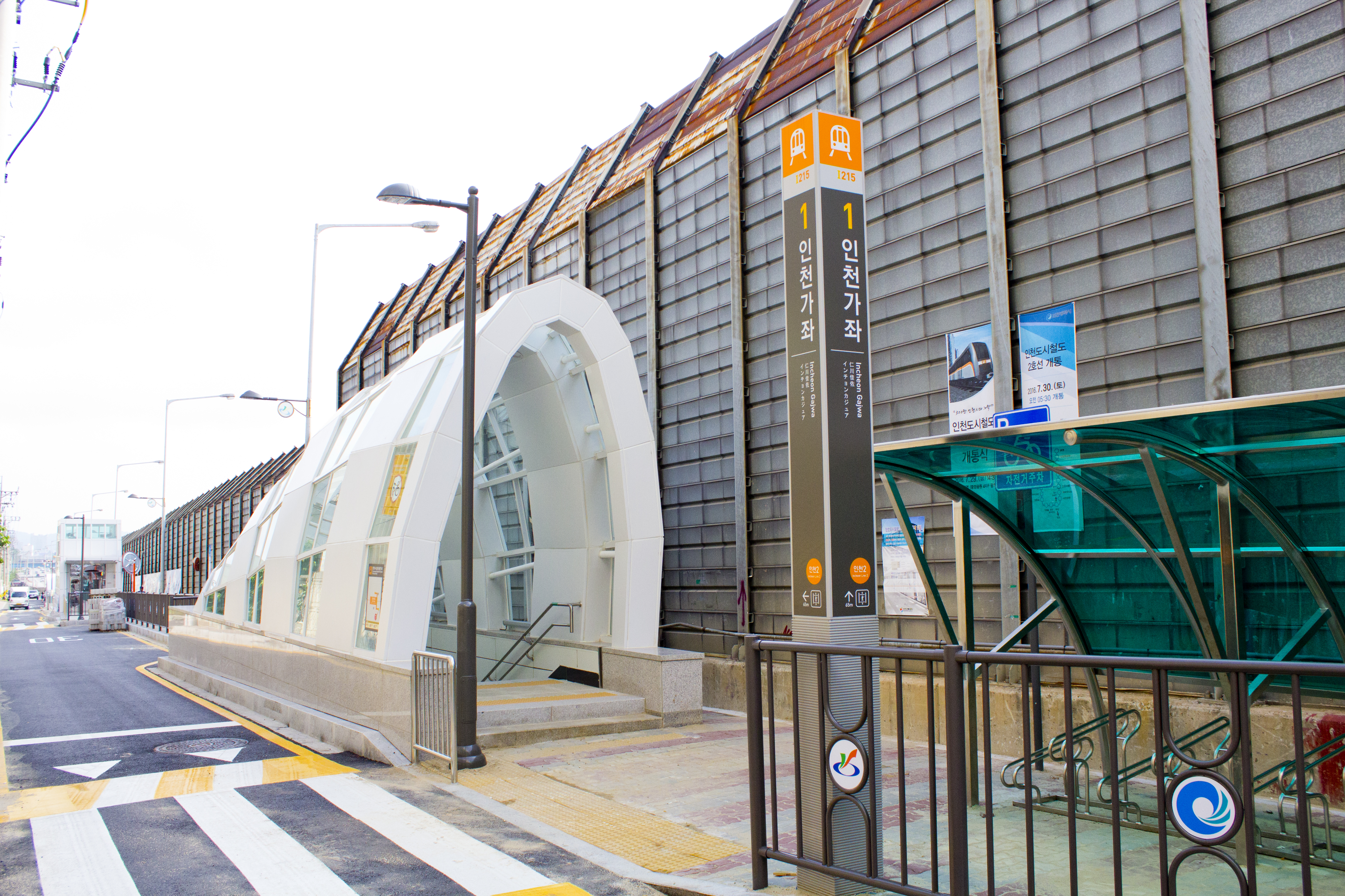 인천2호선 인천가좌역 1번 출구 (주간)